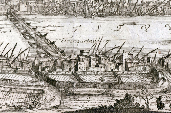 Vue d’Arles en 1660 (détail) Vue de Trinquetaille et du pont de bateaux.